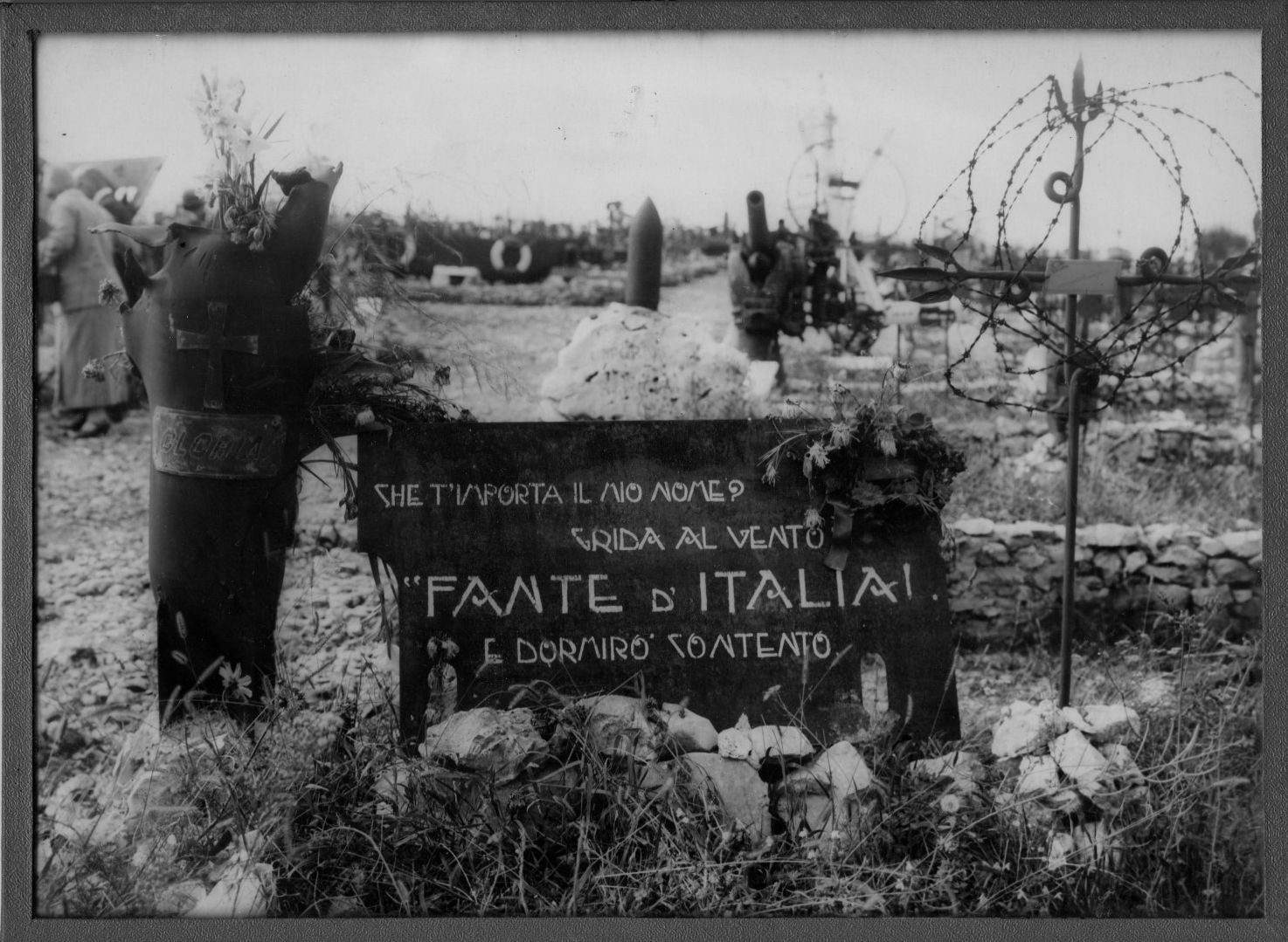 Particolare di una tomba del primo cimitero di Redipuglia con versi di Giannino Antona Traversi